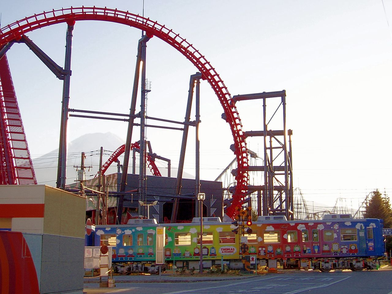 at Fujikyu Highland Roller Coaster "E-e-ja-naika" Fujikyu EMU Type 5000